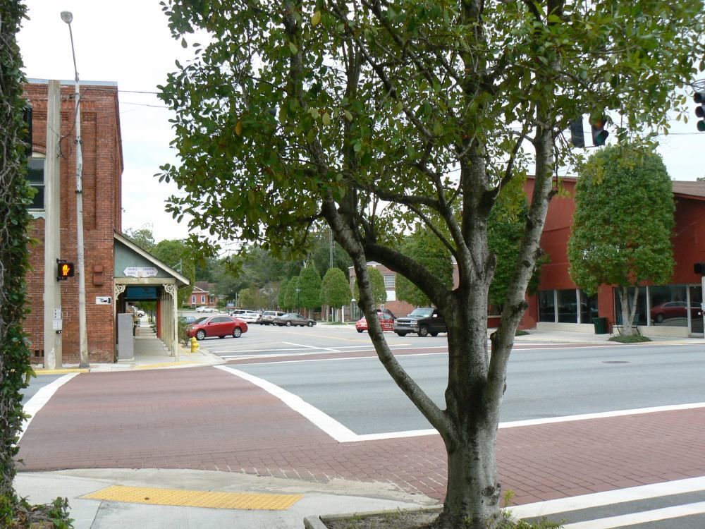 Havana FL, USA